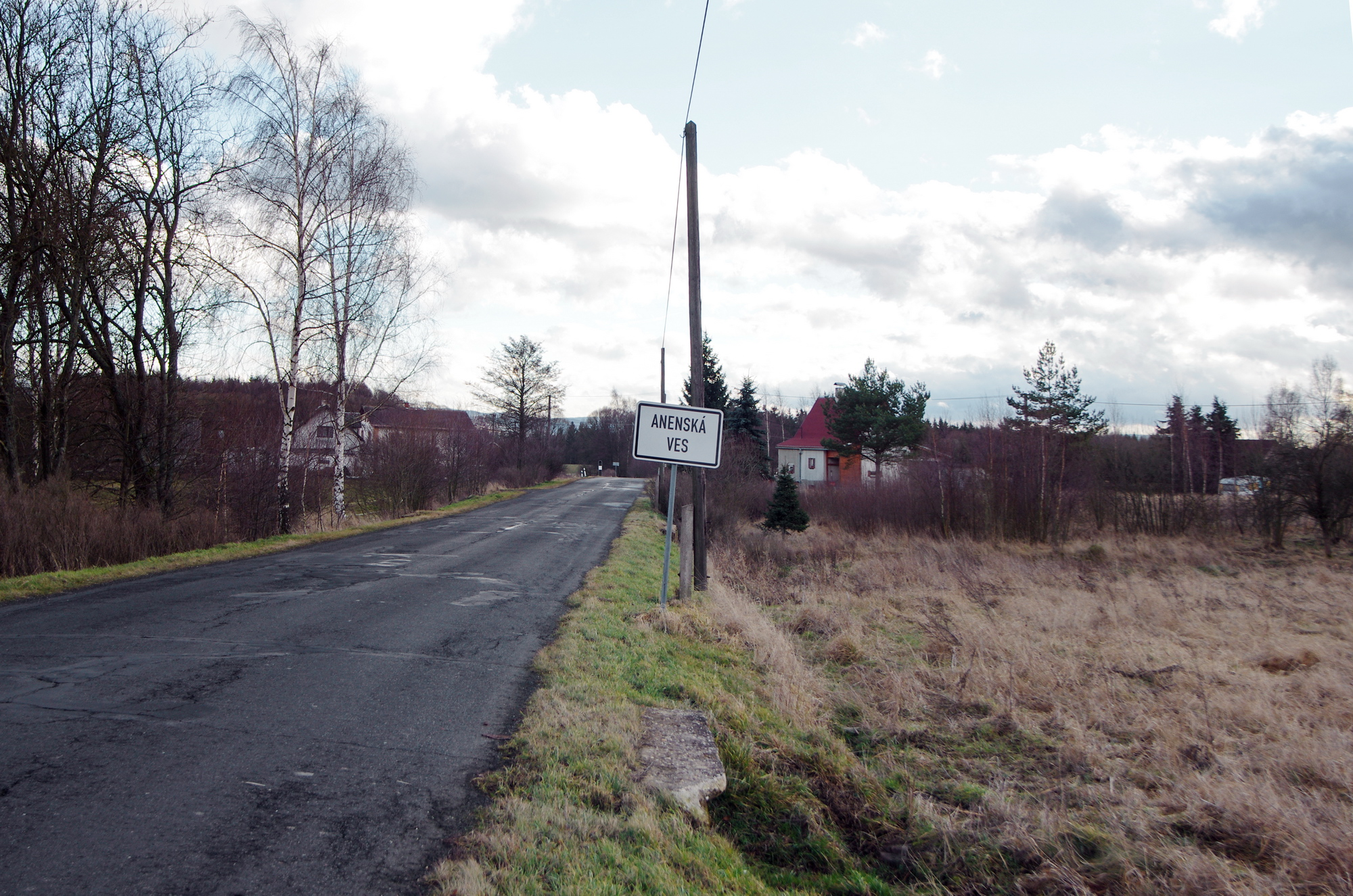 Anenská Ves, část obce Krajková, okres Sokolov